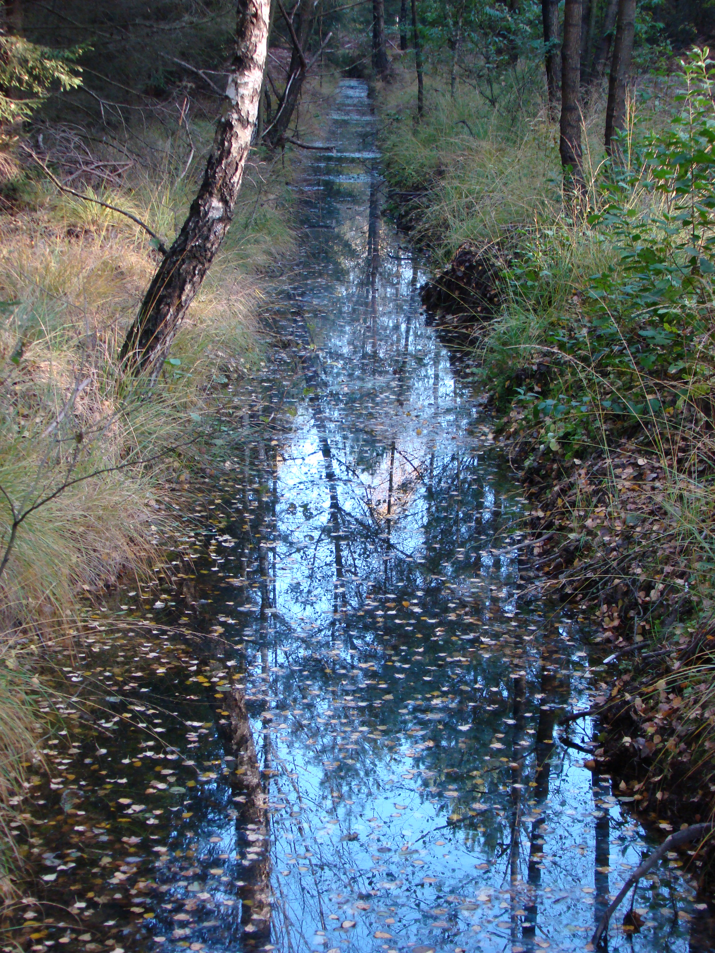 Entwässerungsgraben im Bornriethmoor